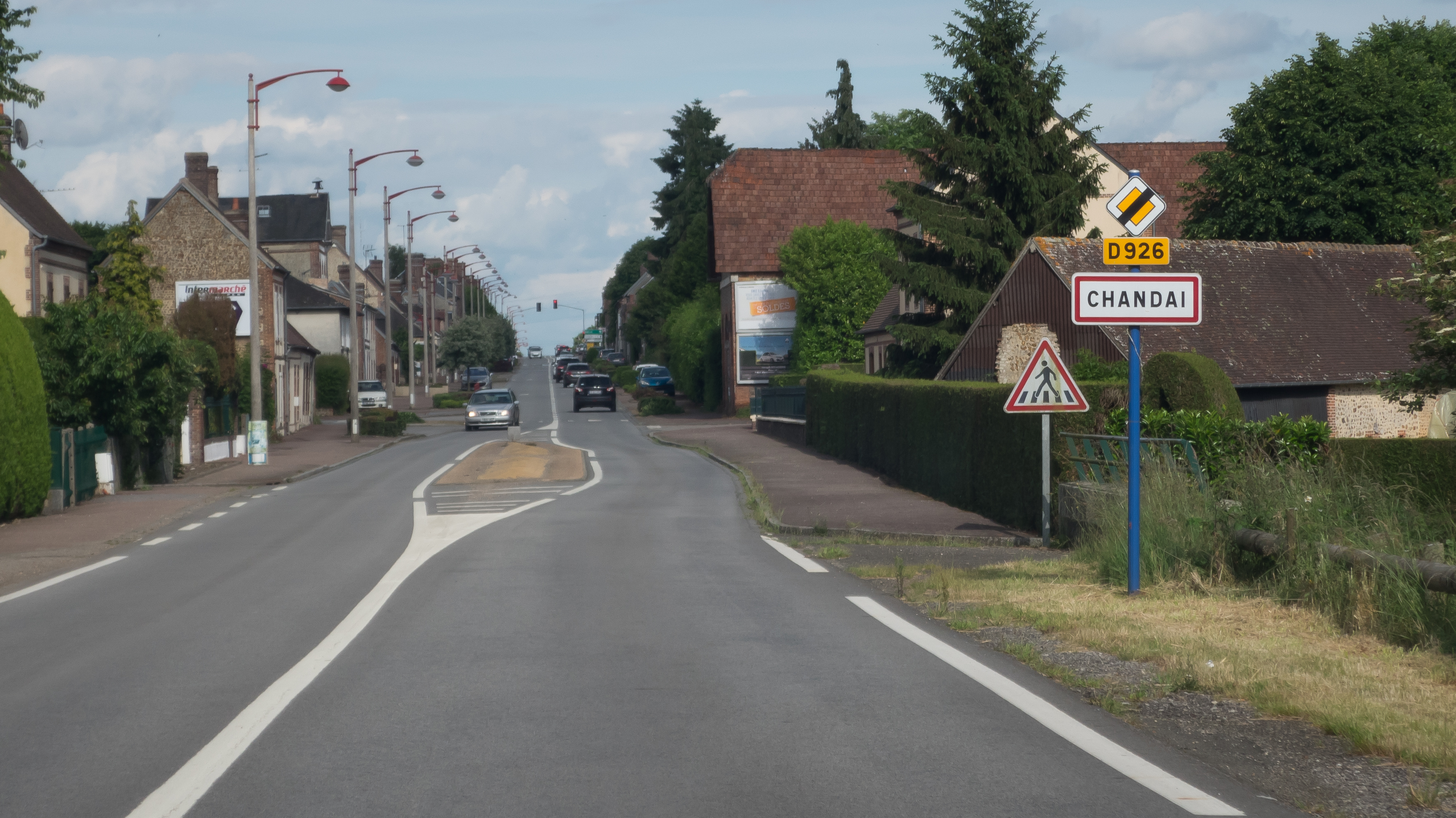 La route départementale D926 à Chandai (Orne, Normandie, France)